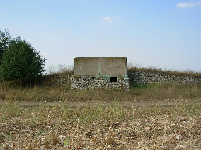 Резервоар за приготвяне на разтвори за пръскане на лозя